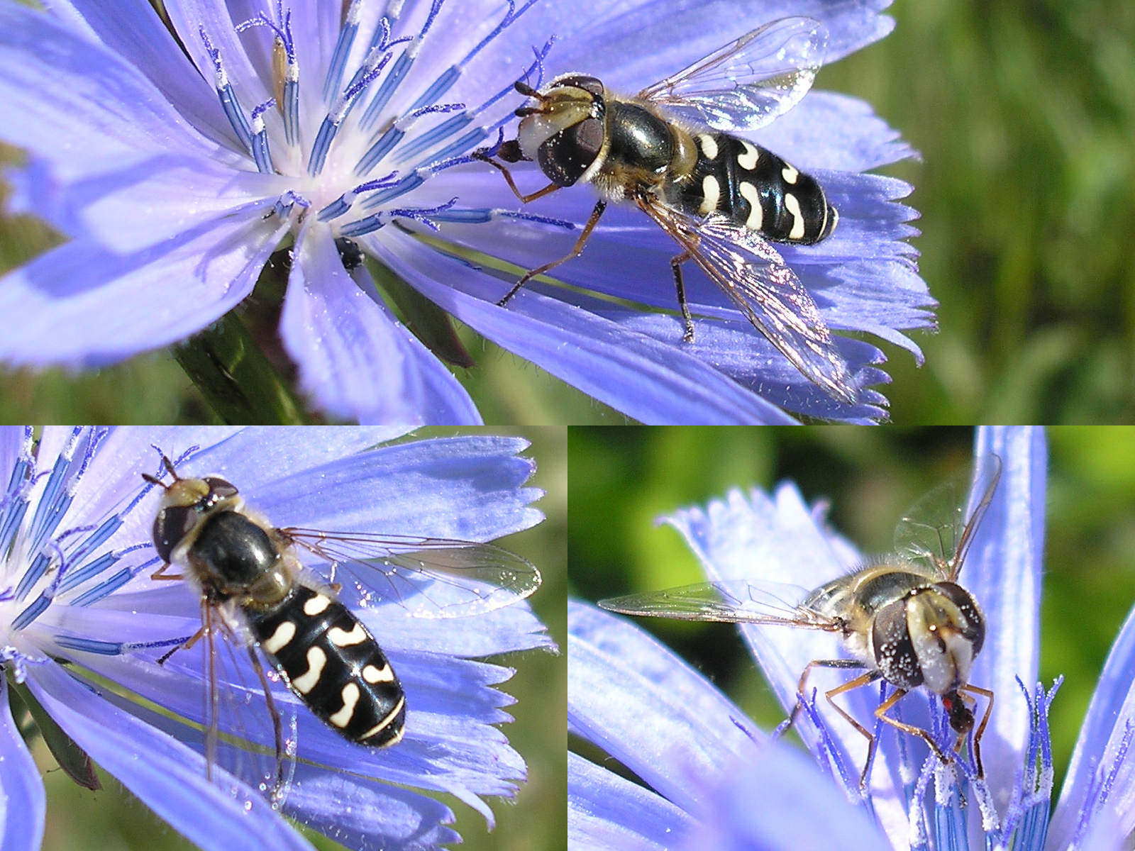 Some Flower-fly - (Scaeva pyrastri) on a flower of Common chicory (Cichorium intybus) Location: Near exit 54 (to Skovsby) on E20 in Denmark Keywords: Syrphidae --- nl: Witte halvemaanzweefvlieg (Scaeva pyrastri) op Wilde cichorei (Cichorium intybus) Locatie: Omgeving Skovsby (bij afrit 54 van E20) (DK) Trefwoorden: maanvlekzweefvlieg, halvemaanzwever, zweefvlieg, halve maan, wit, parasiet, mijt --- de: Späte Großstirnschwebfliege (Scaeva pyrastri) auf Blume einer Gemeine Wegwarte (Cichorium intybus) Suchwörter: Blasenköpfige Schwebfliege, Halbmondschwebfliege --- fr: La Syrphe pyrastre (Scaeva pyrastri) sur une fleur de Chicorée sauvage (Cichorium intybus)